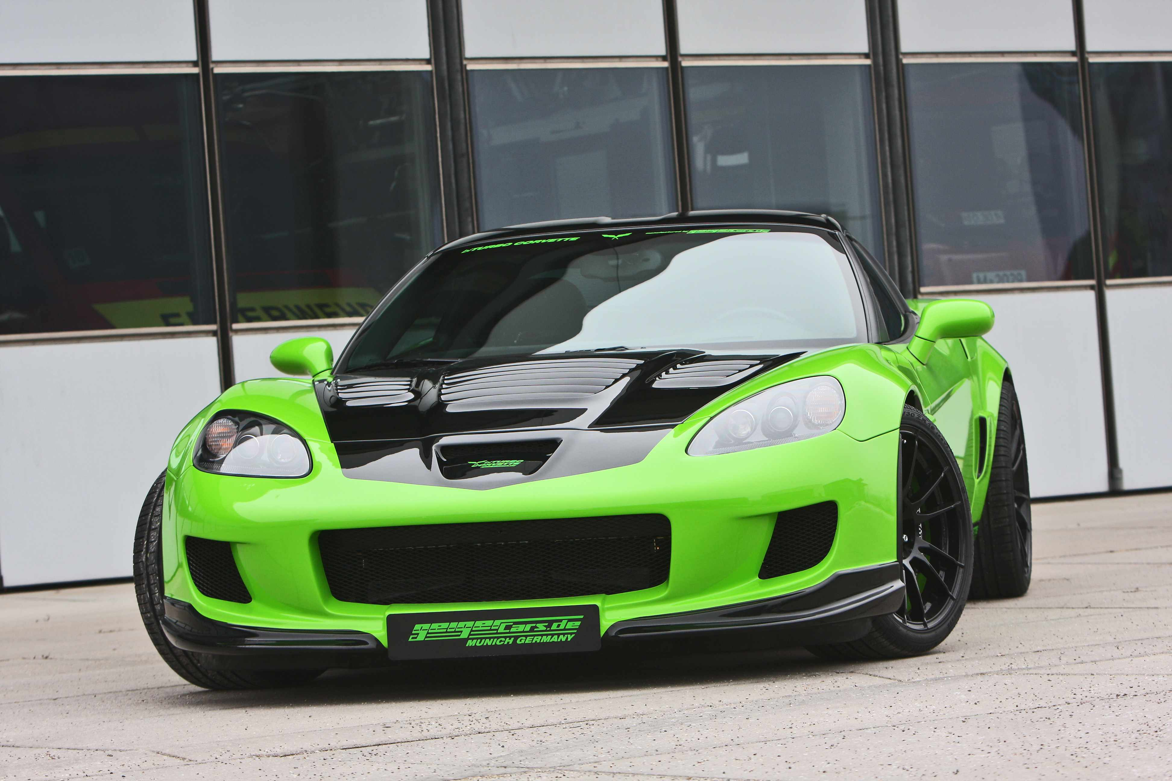 Geiger Corvette C6 mit Kompressor. Weltrecordfahrzeug für Corvette Fahrzeuge